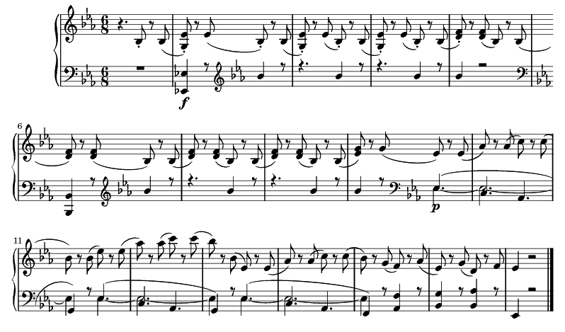 Tema del cuartom movimiento de la sonata Op 31 nº 3 de Ludwig van Beethoven